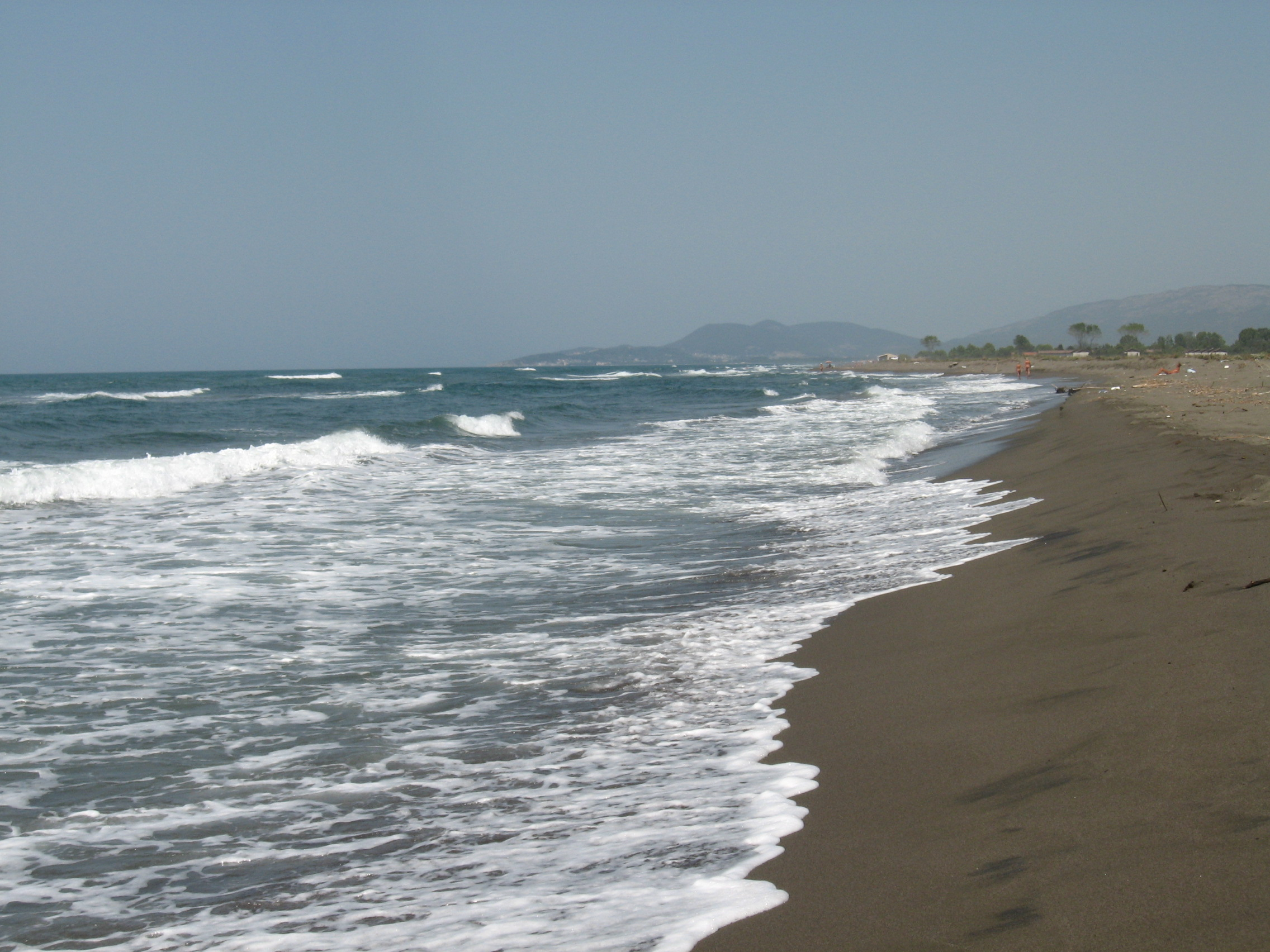 Plaža na Adi Bojani.